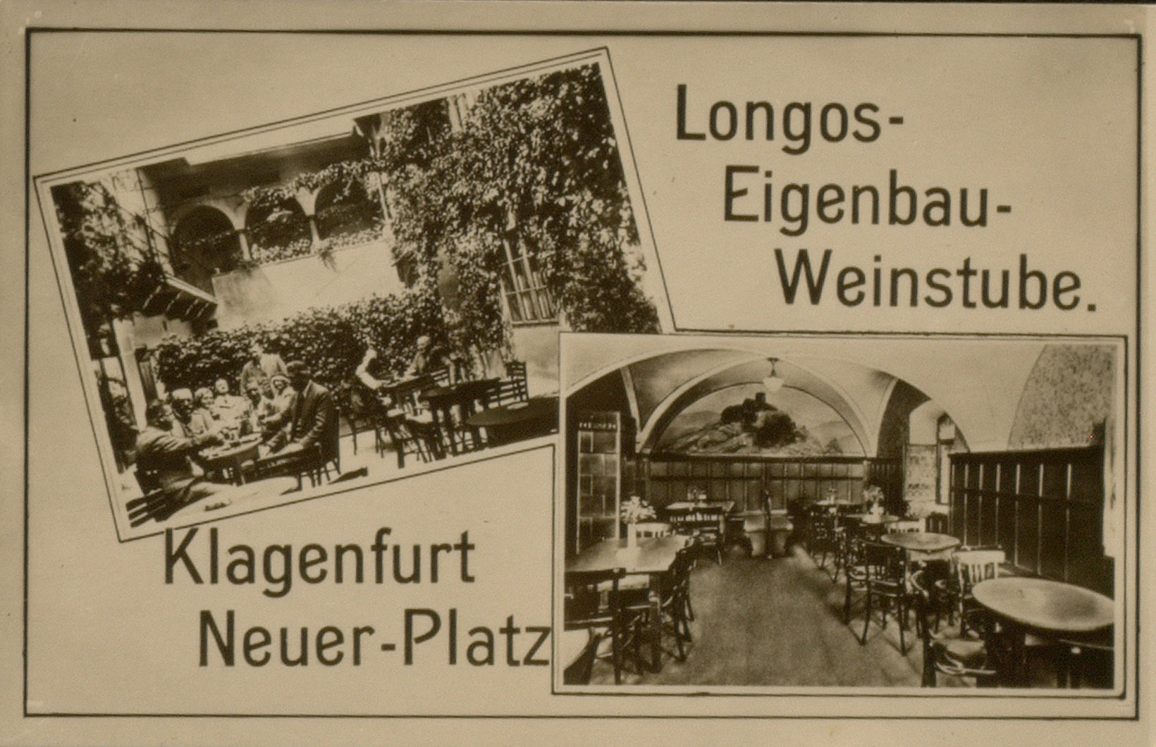 Longo's Tiroler Eigenbau Weinstube Klagenfurt, alter Platz